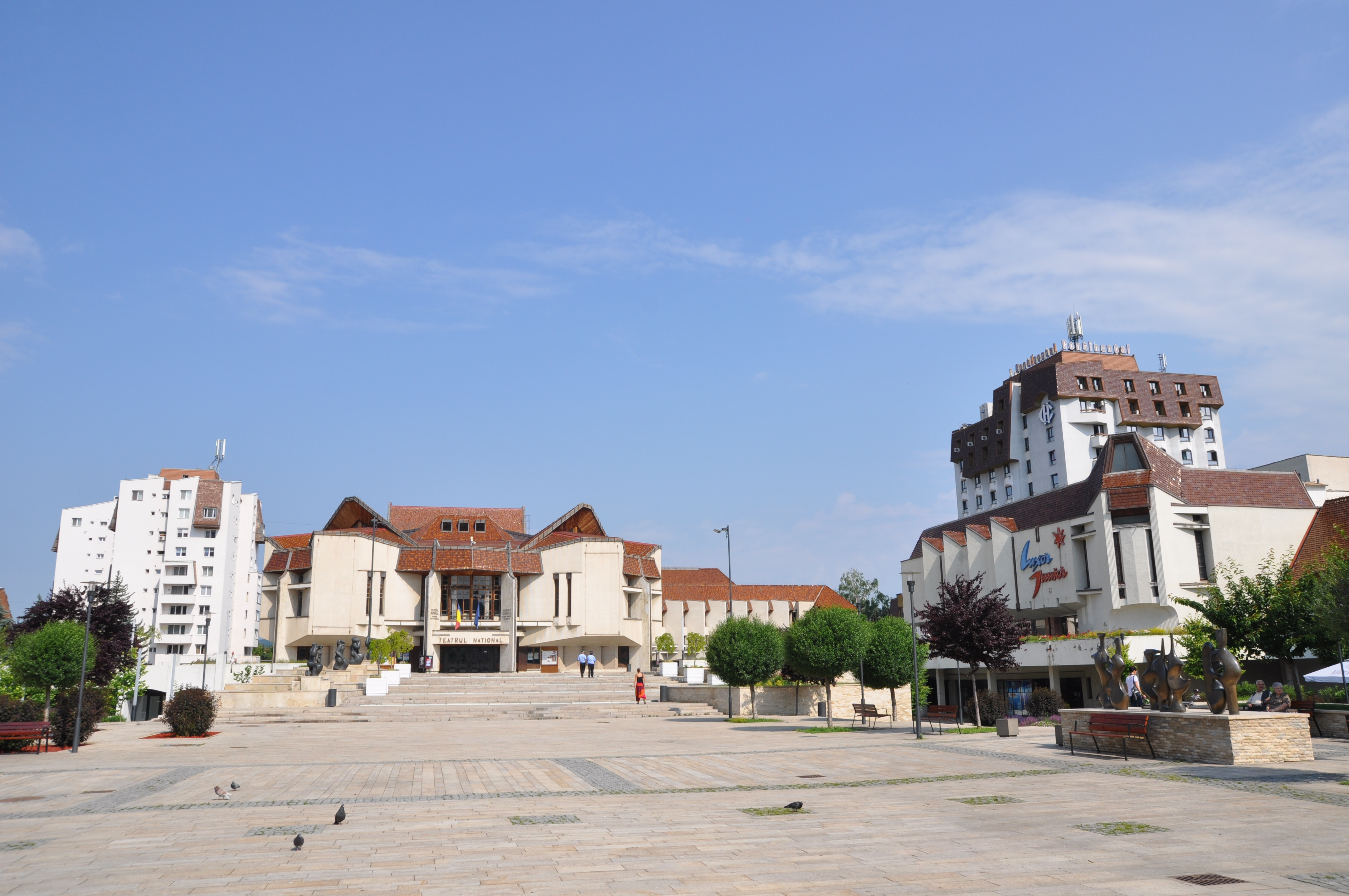 Erdély, Marosvásárhely, Nemzeti Színház